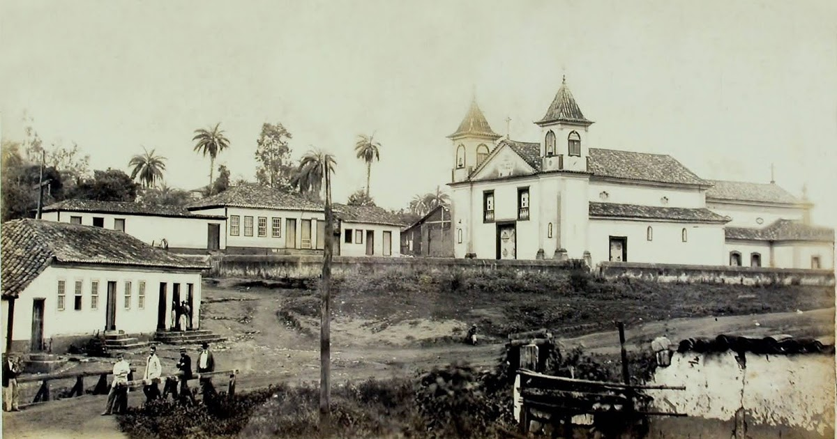 Arraial de Curral del Rey, em 1890